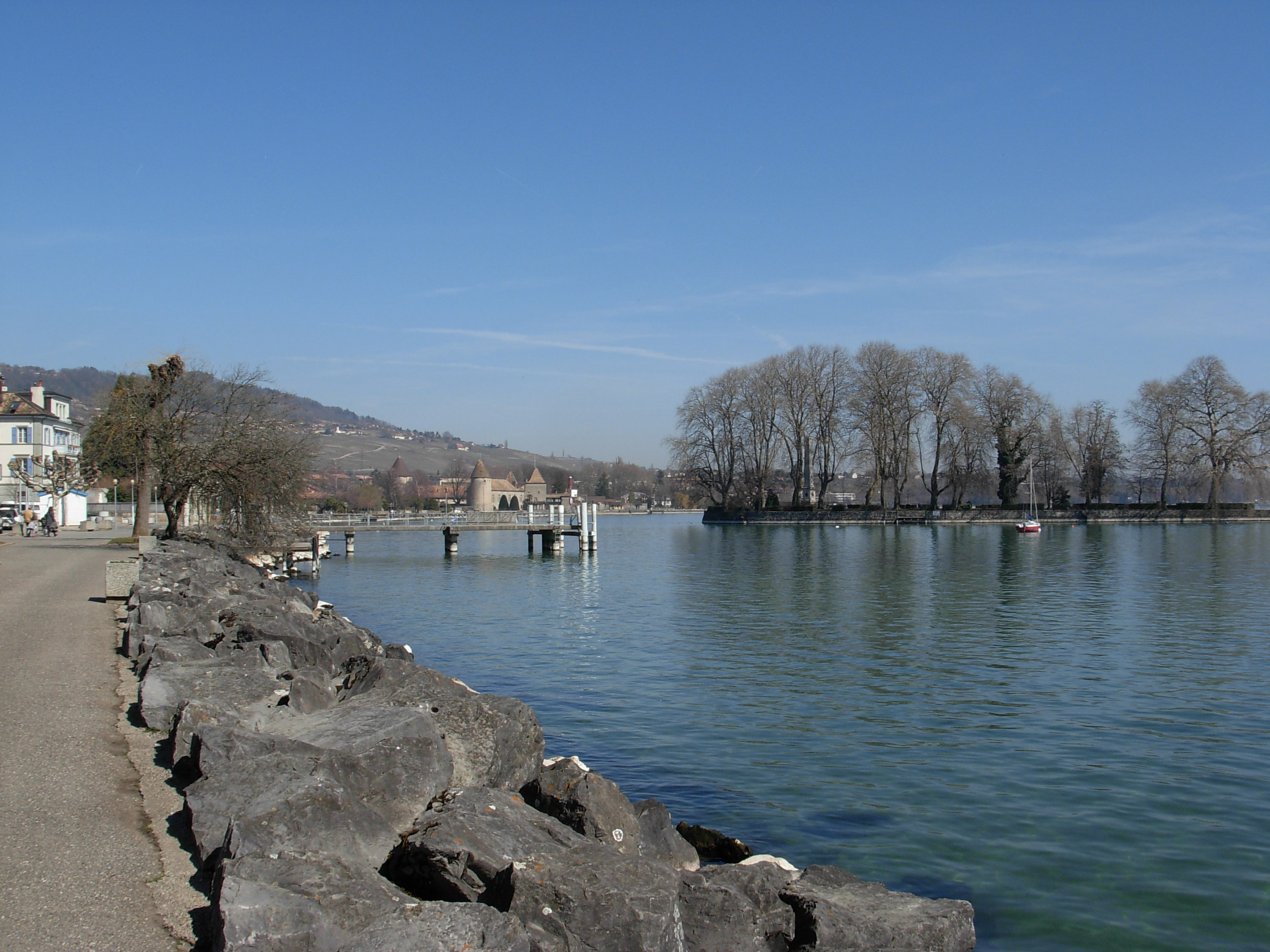 Château et Île de la Harpe - Rolle